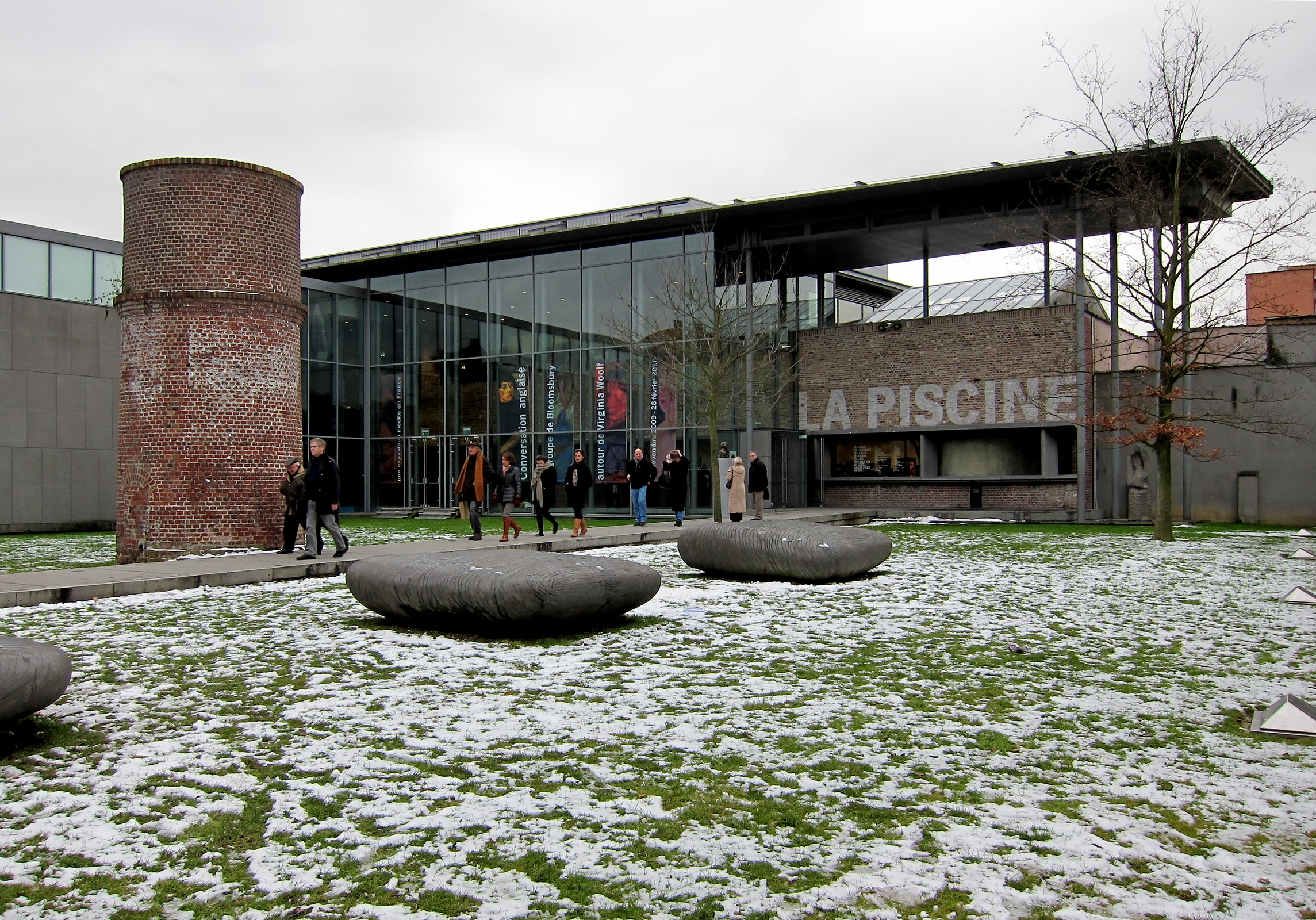 L'entrée de la Piscine, Musée d'Art et d'Industrie de Roubaix (Nord).